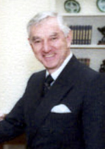 David Murdock